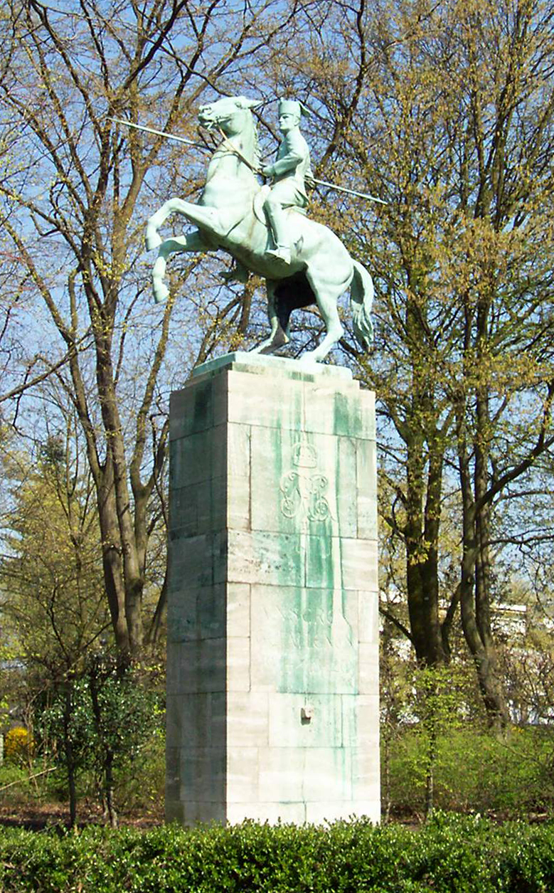 Bildbeschreibung: Denkmal für die gefallenen Tanzhusaren, 1929, Grafschaftsplatz, Krefeld Quelle: selbst fotografiert Fotograf/Zeichner: DER UNFASSBARE